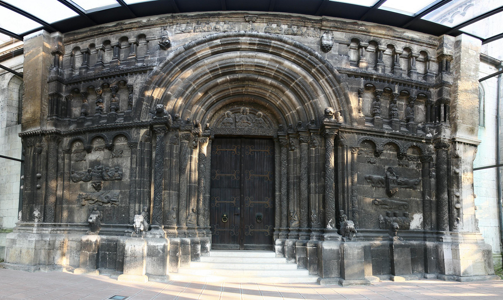 Beschreibung: Regensburg Schottenportal der St. Jakob Kirche Quelle: selbst fotografiert Datum: Juni 2006 Fotograf: Karsten Dörre (grizurgbg)